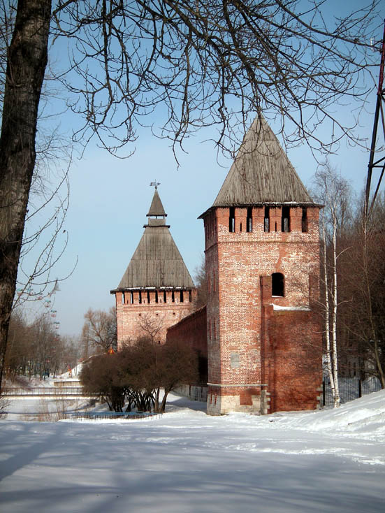 Башня Бублейка Смоленского Кремля